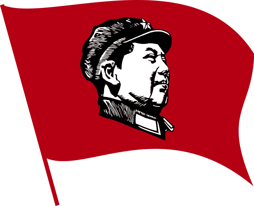 Rudá vlajka s Mao Ce Tungem